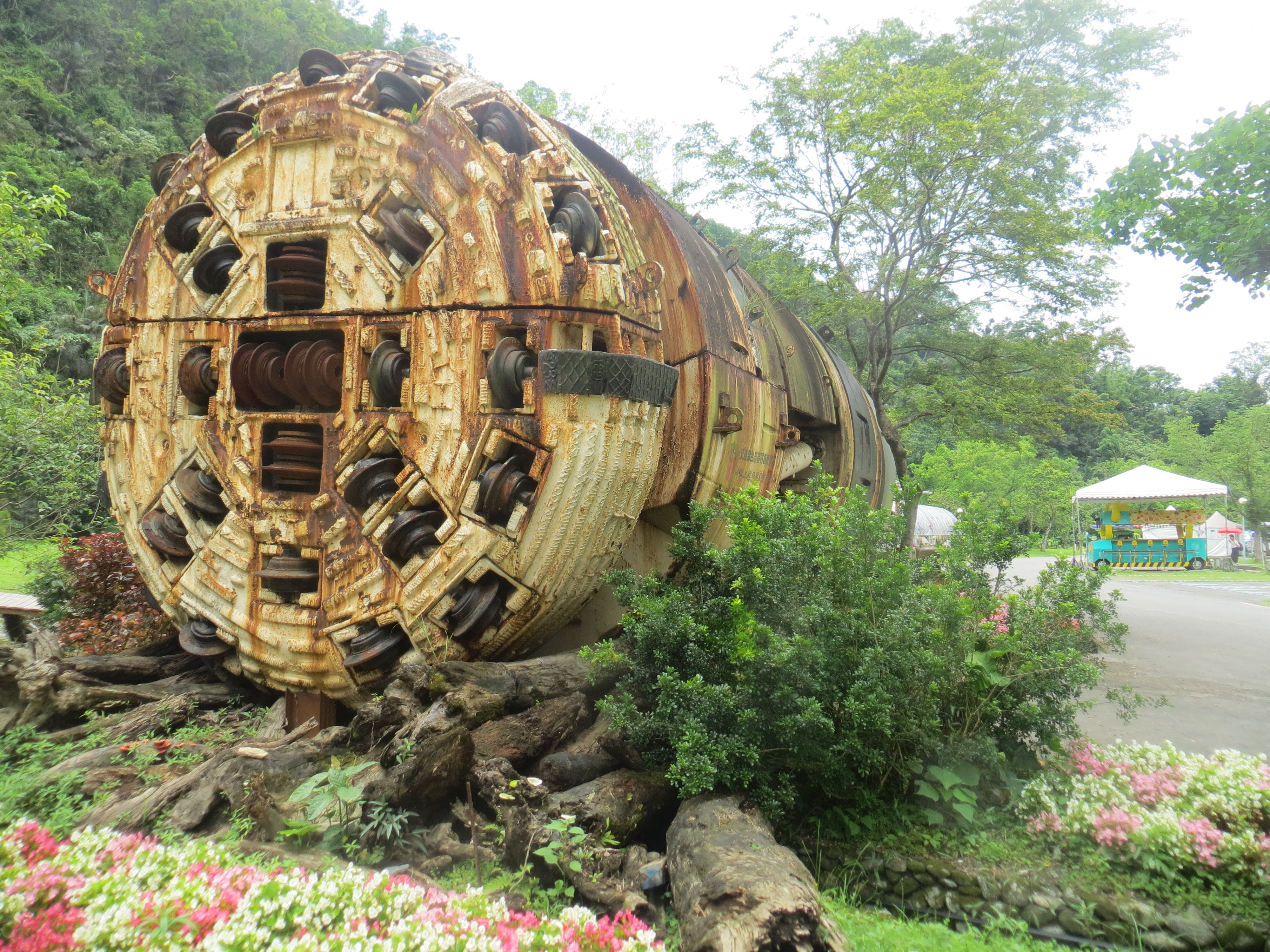 自2014年綠博起，永久展示於武荖坑風景區內的隧道鑽掘機，依其開挖面直徑判斷，若曾參與雪山隧道工程，則應為雪隧導坑開挖用。2016年5月12日。